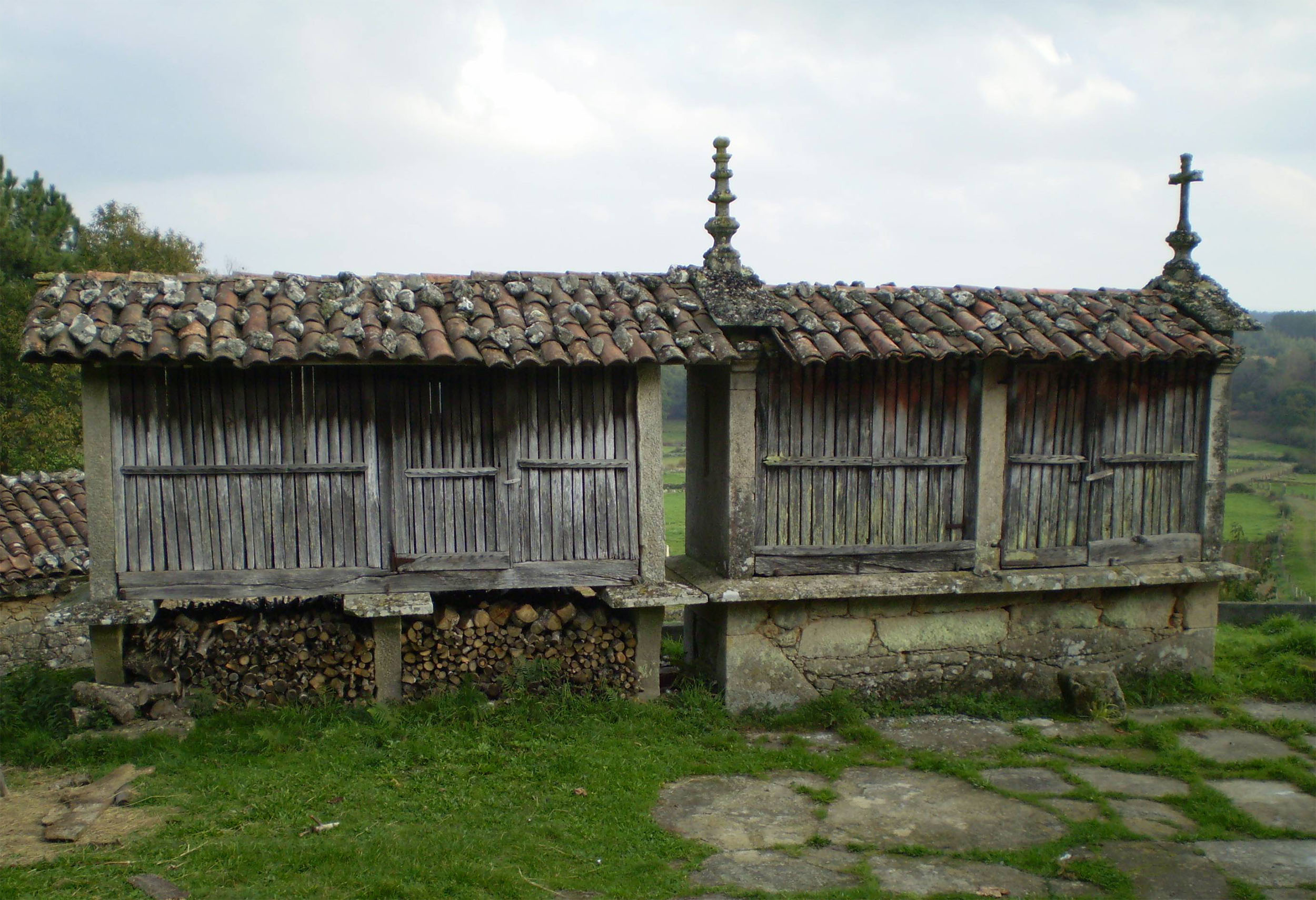 Dous hórreos de tipo mahía, ambos de dous claros e con cuberta de tella do país; o da esquerda sobre cepas e ménsulas e o da dereita sobre soleira. O primeiro non presenta adornos e o segundo loce lampión e cruz latina. Pertences a dúas propiedades diferentes pero que comparten a aira. Ubicados no lugar de Frádegas (Antas de Ulla)